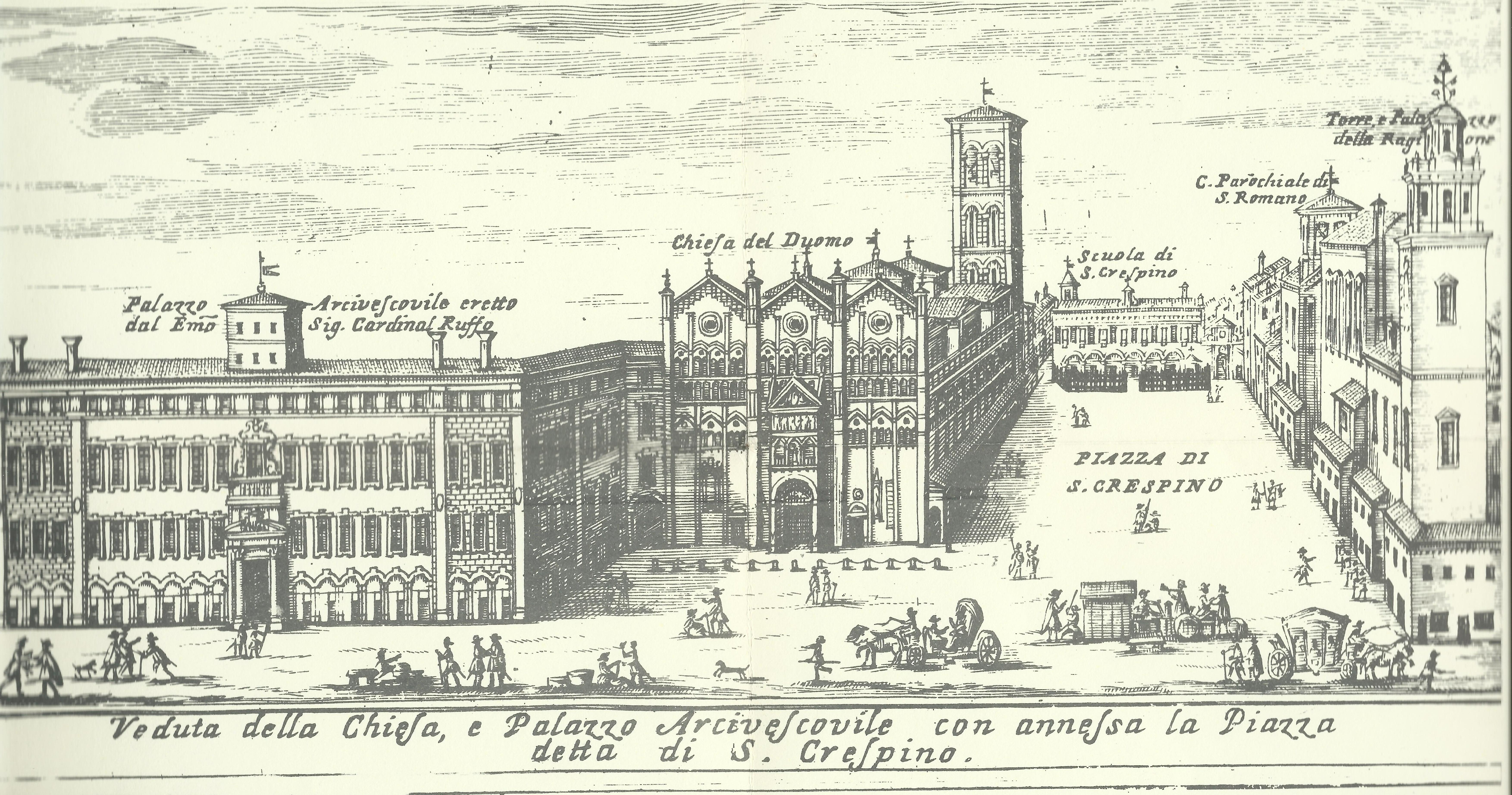 Incisione, Veduta della Chiesa e Palazzo Arcivescovile con annessa la Piazza detta di S. Crespino